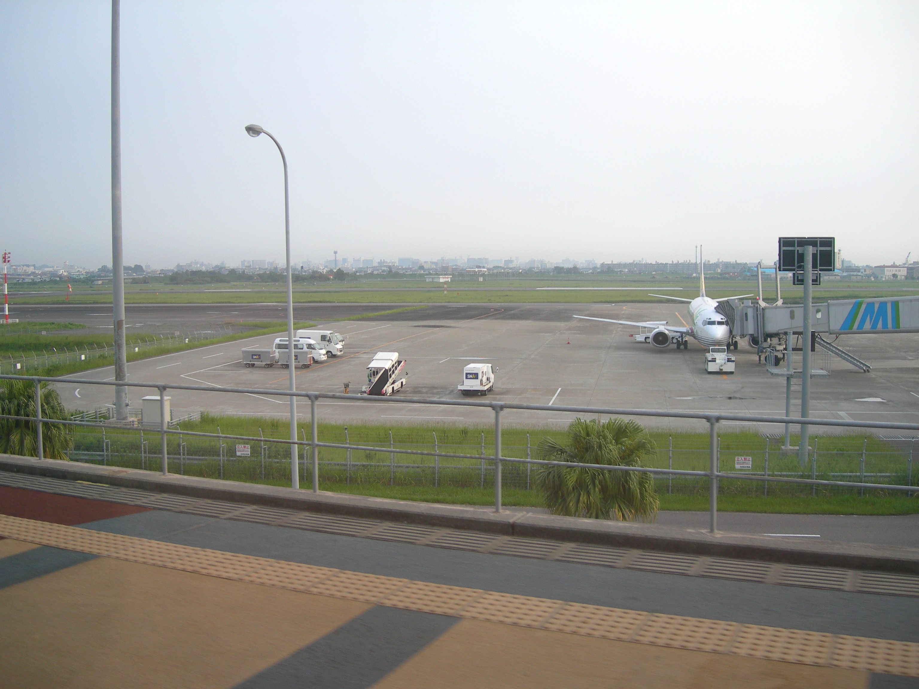 宮崎空港駅プラットホームから宮崎空港を撮影